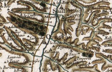 Ornézan sur la carte de Cassini au XVIIIe siècle